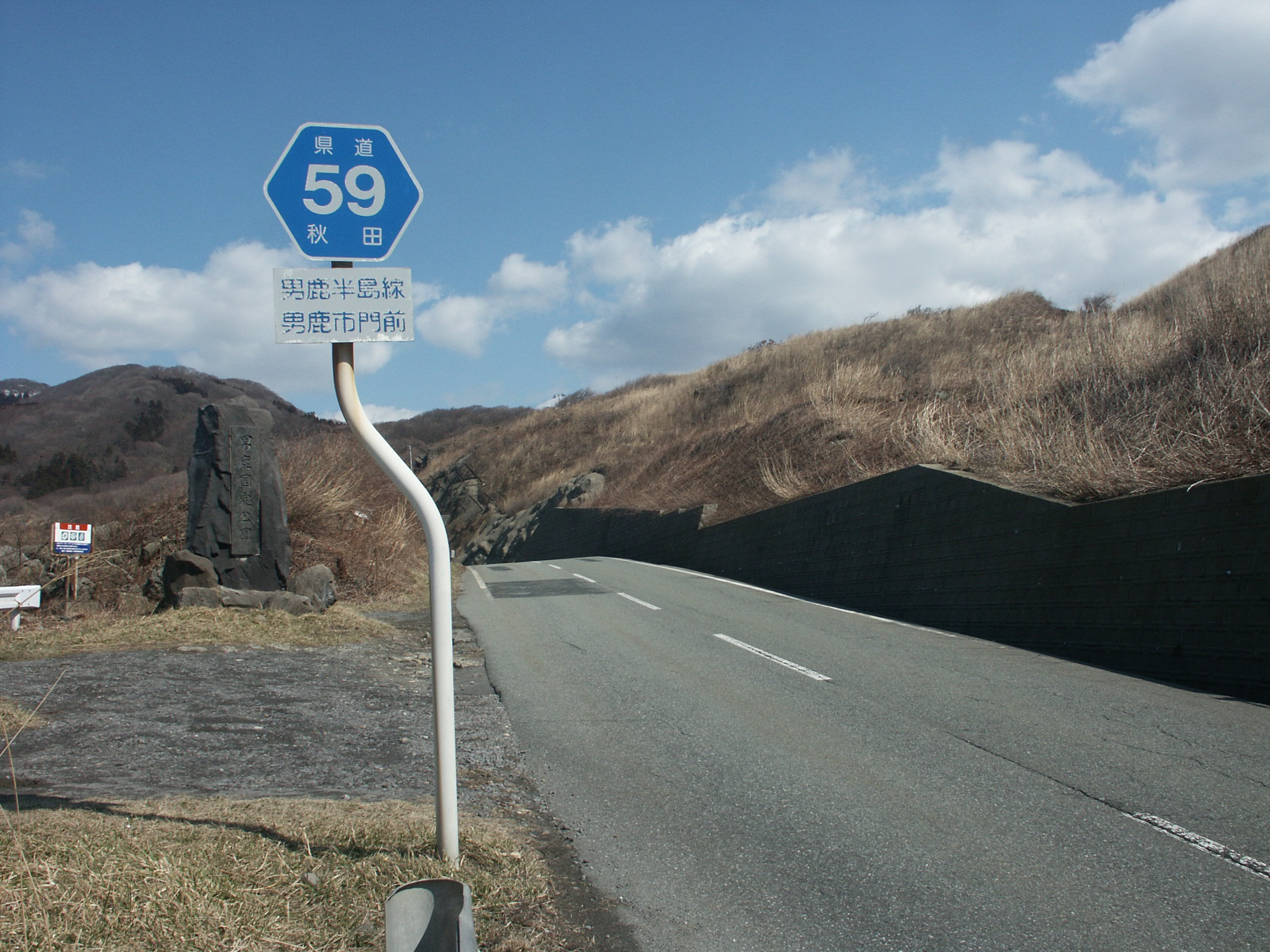 秋田県道59号線男鹿市門前付近